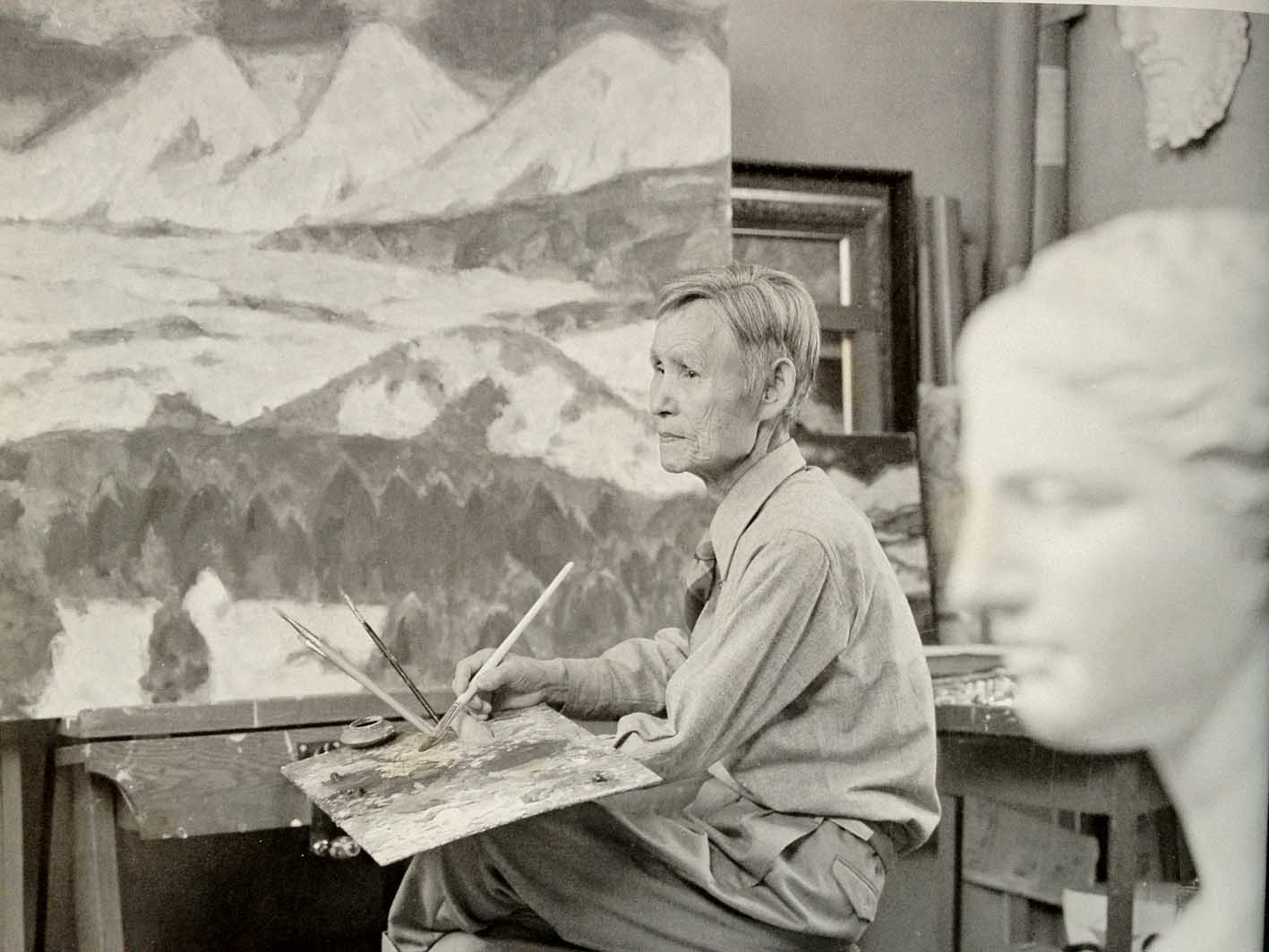 画室で制作中の田代順七